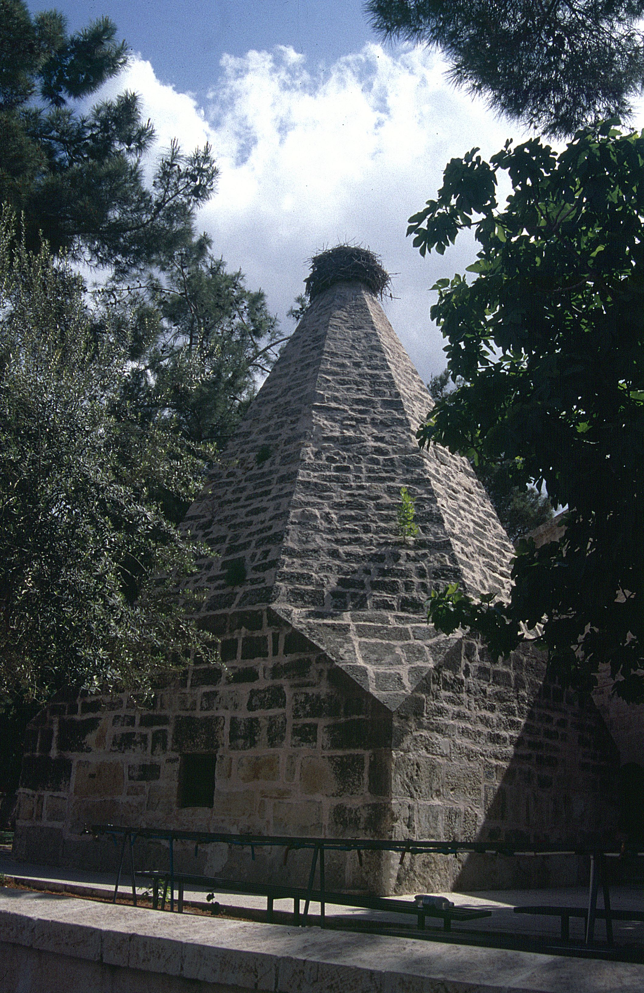 Mut: Hocenti Türbesi